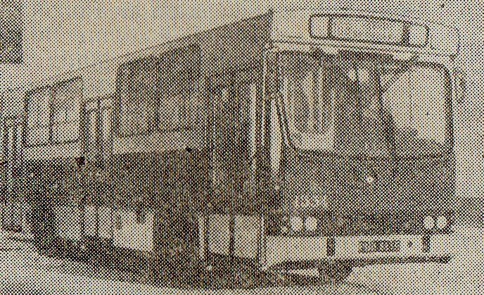 Jelcz M11 - jazda próbna w Poznaniu 17 stycznia 1985r.